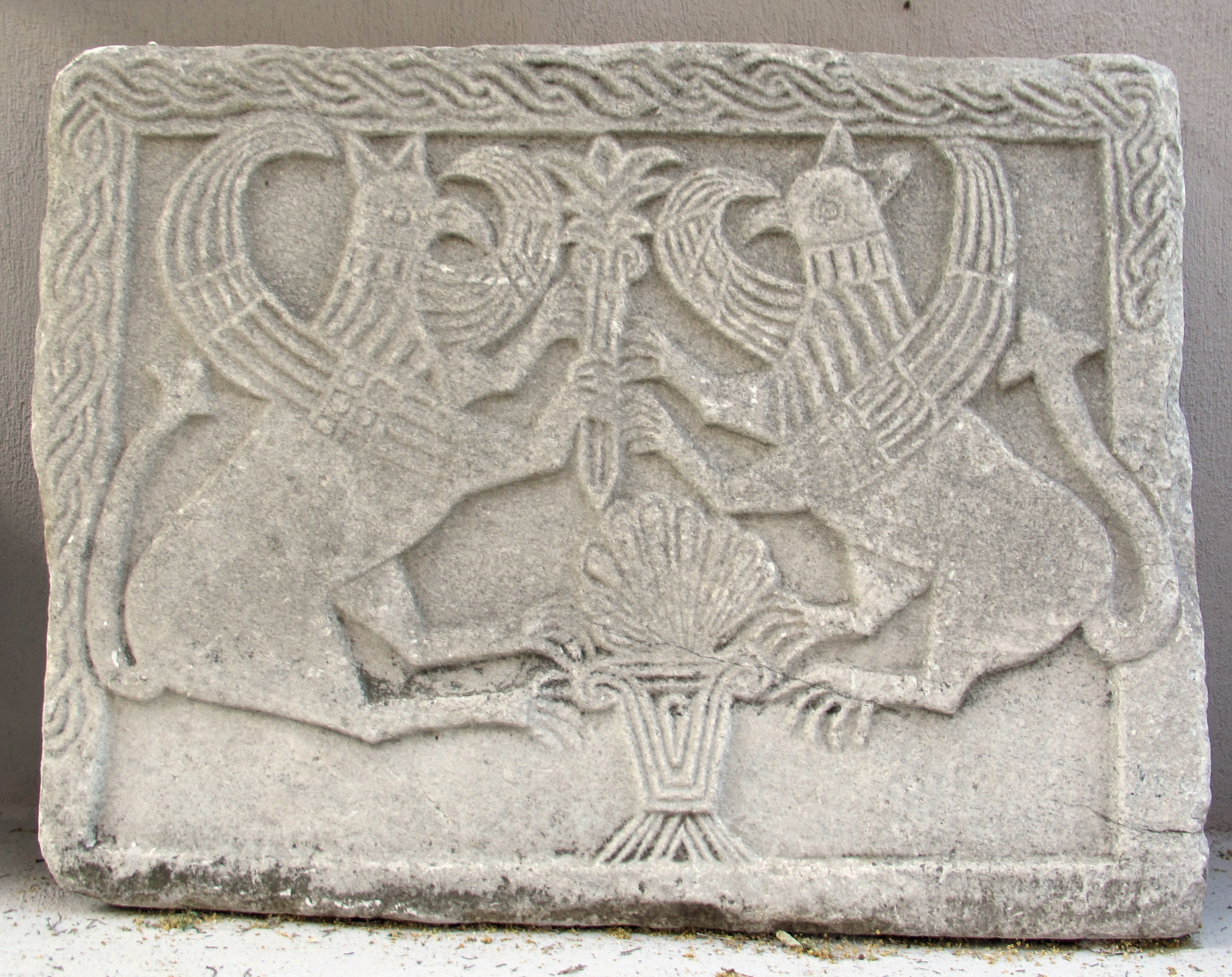 Lapidario del museo di izmir, pannello con grifoni paleocristiani